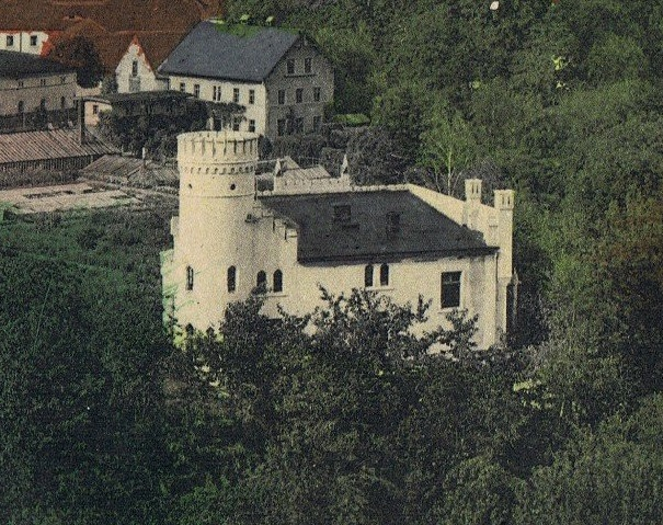 Lwówecki Zameczek przy ul. Kamiennej 3